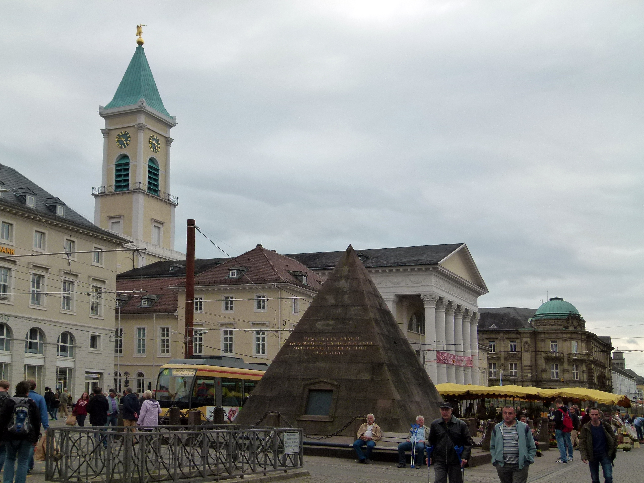 Evangelische Stadtkirche, Karl-Friedrich-Str. 9, 11, 13, Karlsruhe